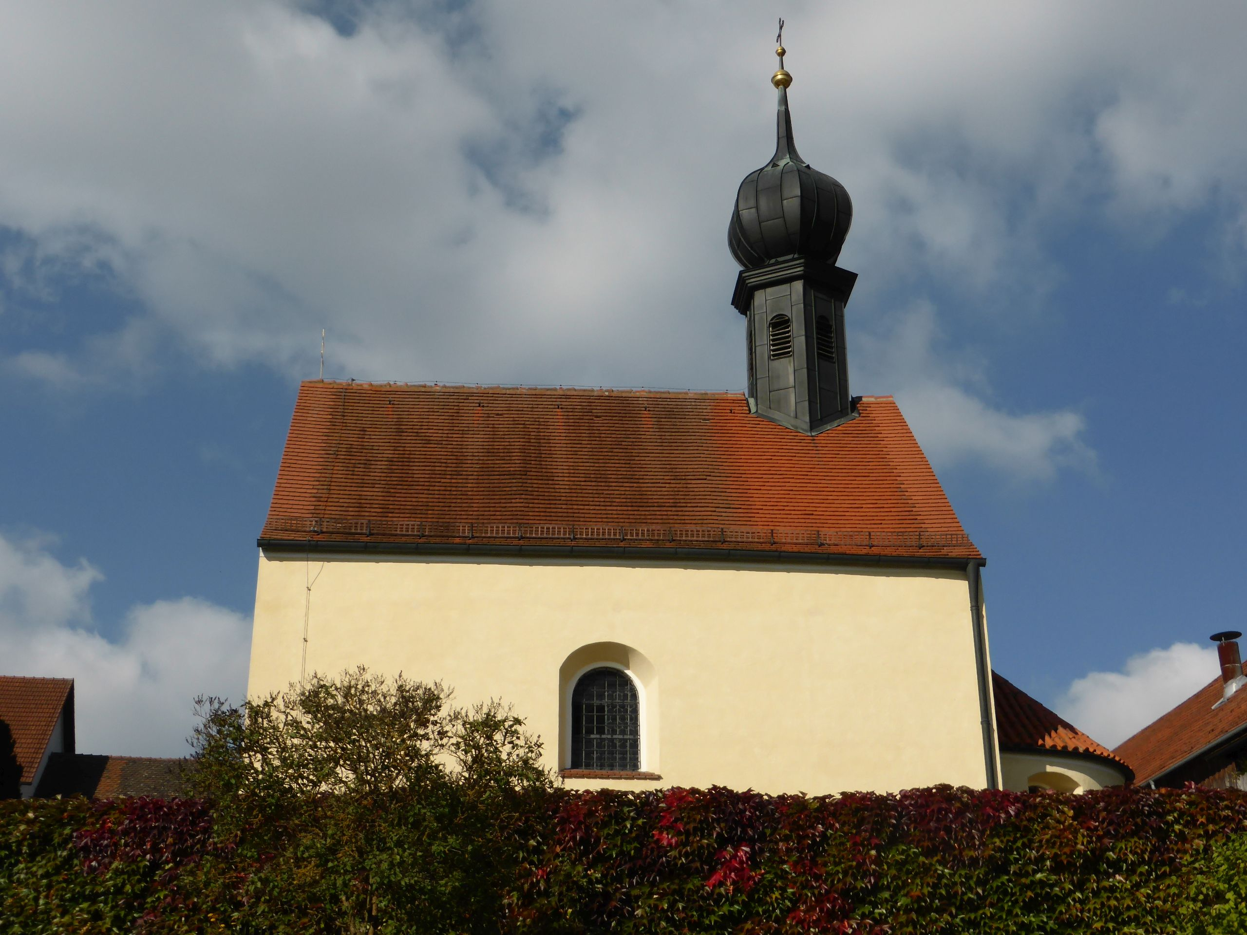 Wolfsegg (Hohenwarth)